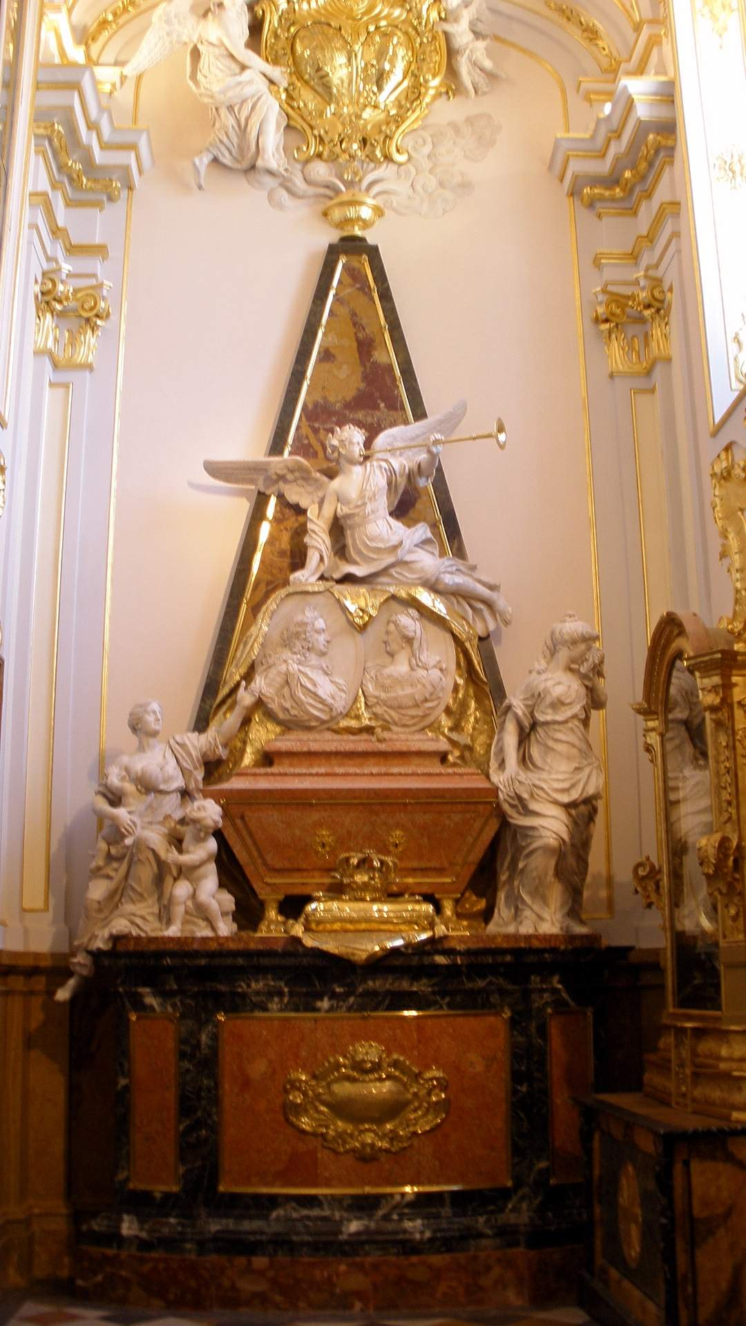 Tumba de Felipe V de España (1683-1746) y de su segunda esposa, la reina Isabel de Farnesio (1692-1766), en el interior de la colegiata del Palacio Real de La Granja de San Ildefonso, ubicado en la provincia de Segovia, (España).